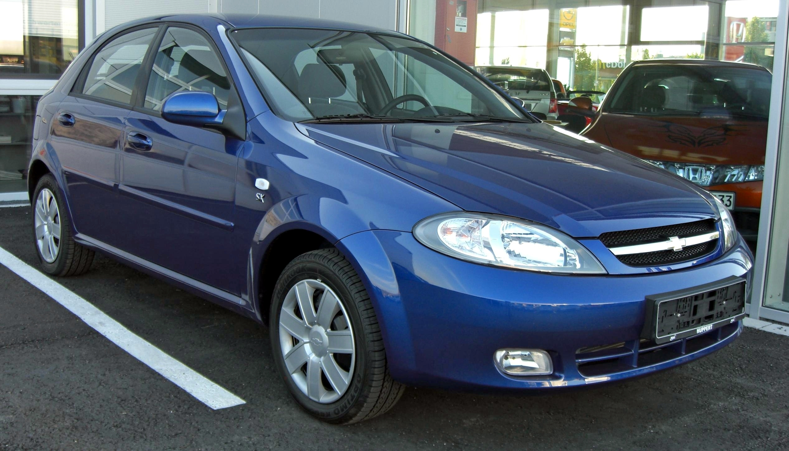 Chevrolet Lacetti